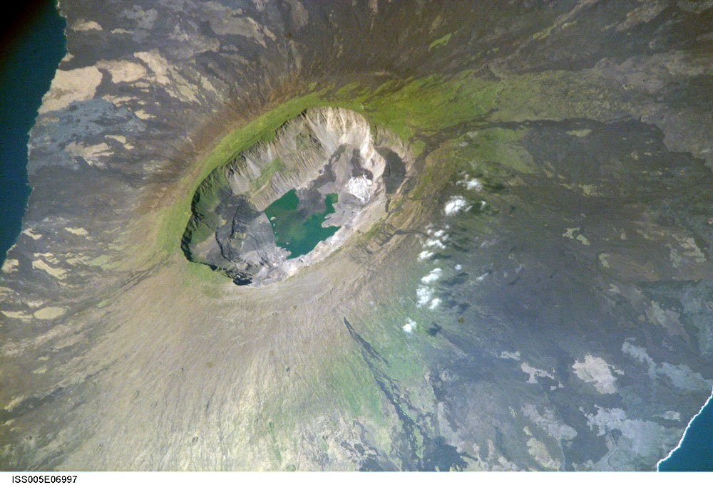 "La Cumbre"-Vulkan op Fernandina vun der ISS gesinn.